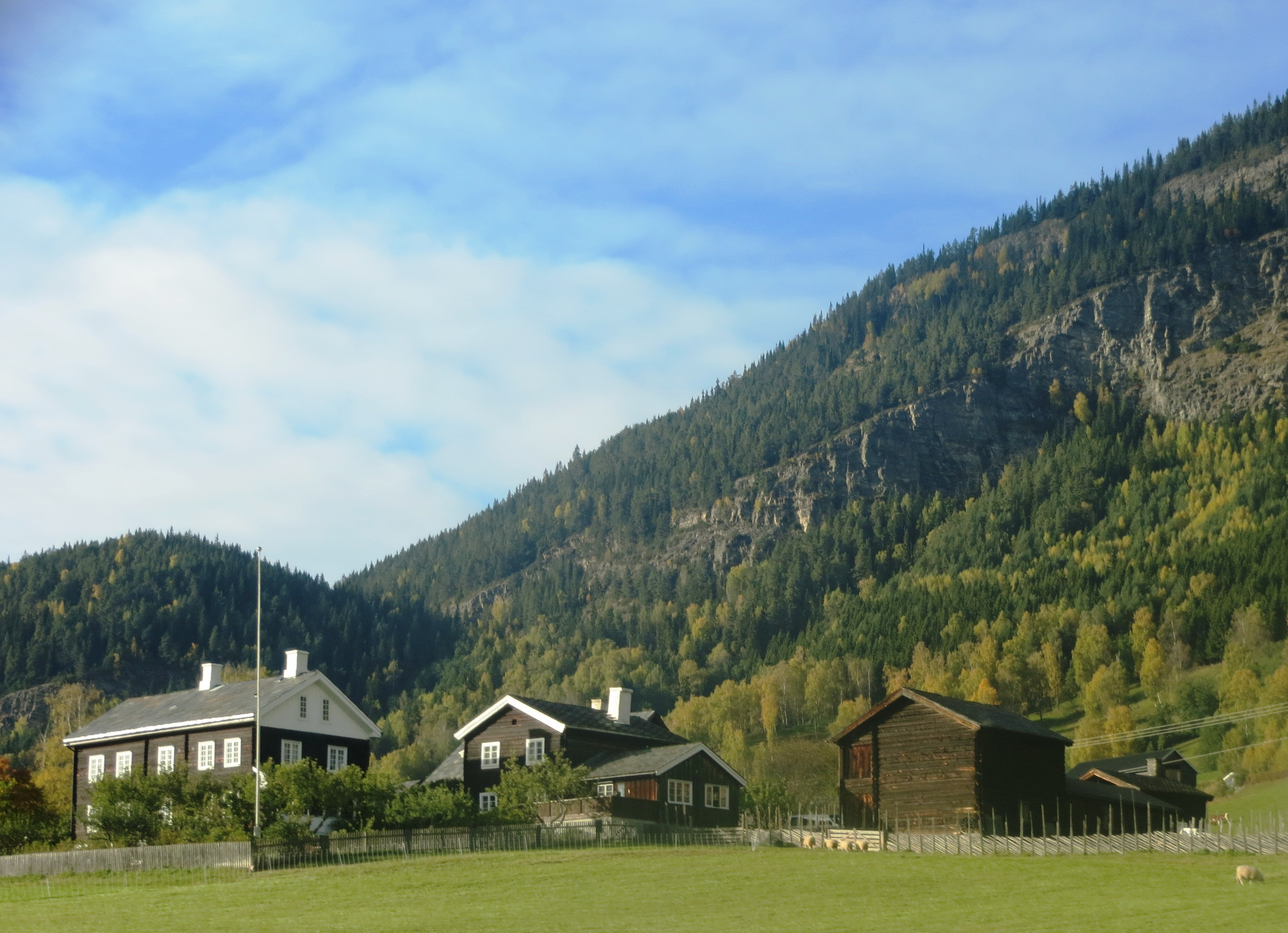 Gården Gryting Sygård i kommunen Sør-Fron, Gudbrandsdal i Oppland.